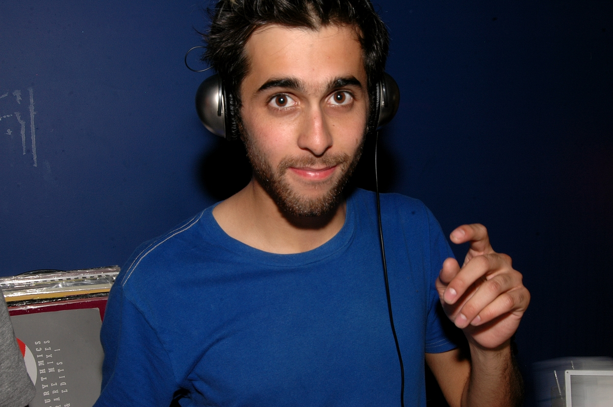 Ramesh Srivastava from Voxtrot Djing